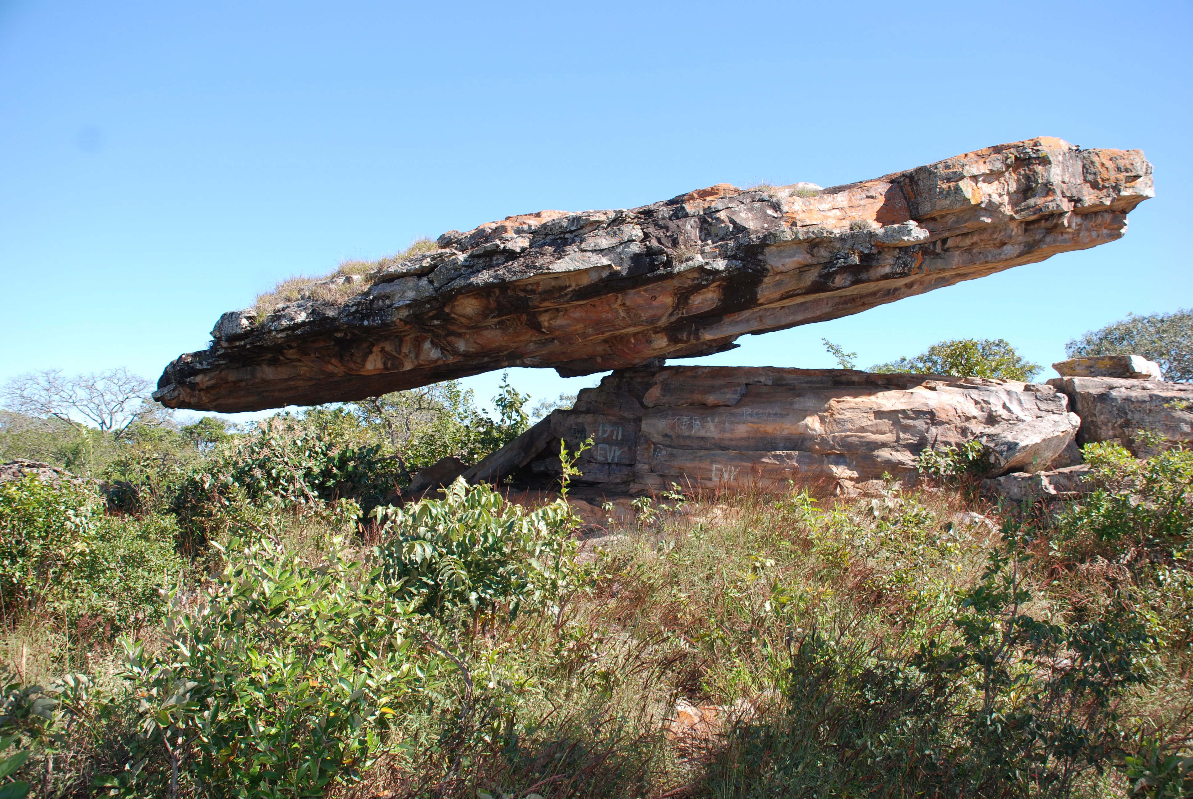 Pedra Chapéu do Sol em Cristalina, localizada a pouco mais de 9 km do centro da cidade é a maior pedra do mundo em equilíbrio a milhares de anos.